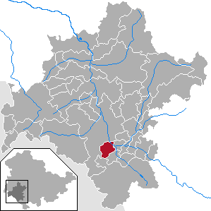 Untermaßfeld in Thuringia - District Schmalkalden-Meiningen